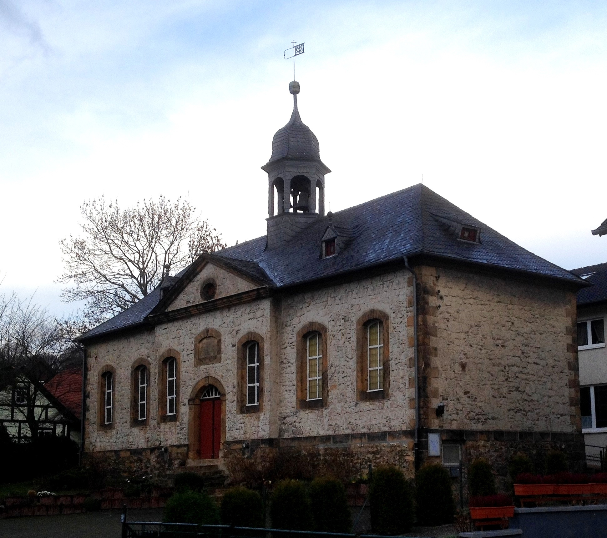 Goslar, evangelisch-freikirchliche Christuskirche, vormals Spitalkapelle St. Pankratius